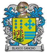 escudo de Blascosancho, Castilla y León, Ávila.